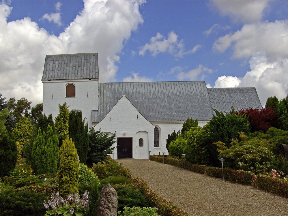 fra syd